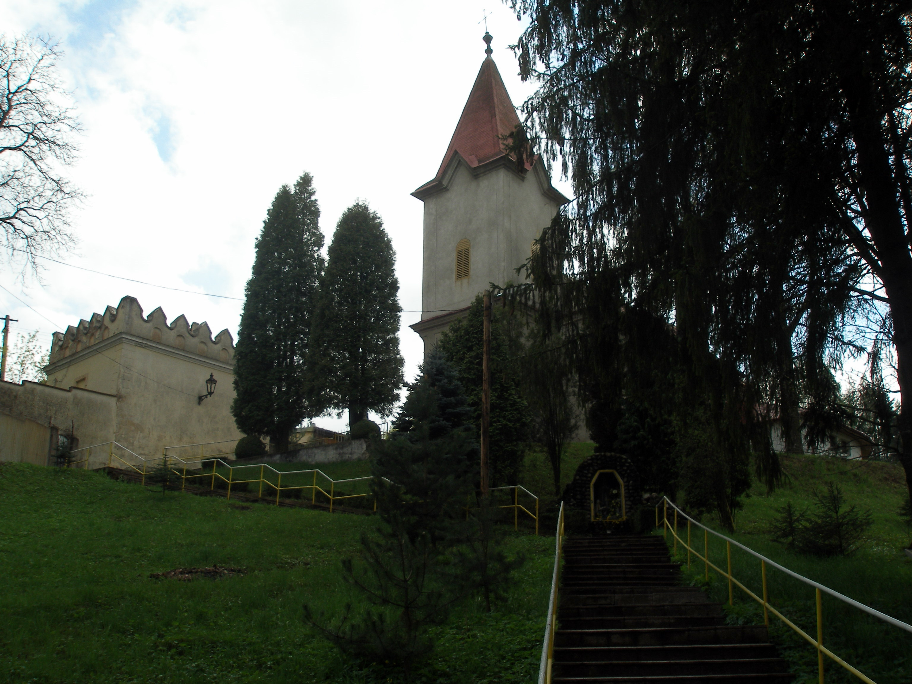 Obec Ličartovce okres Prešov, región Šariš